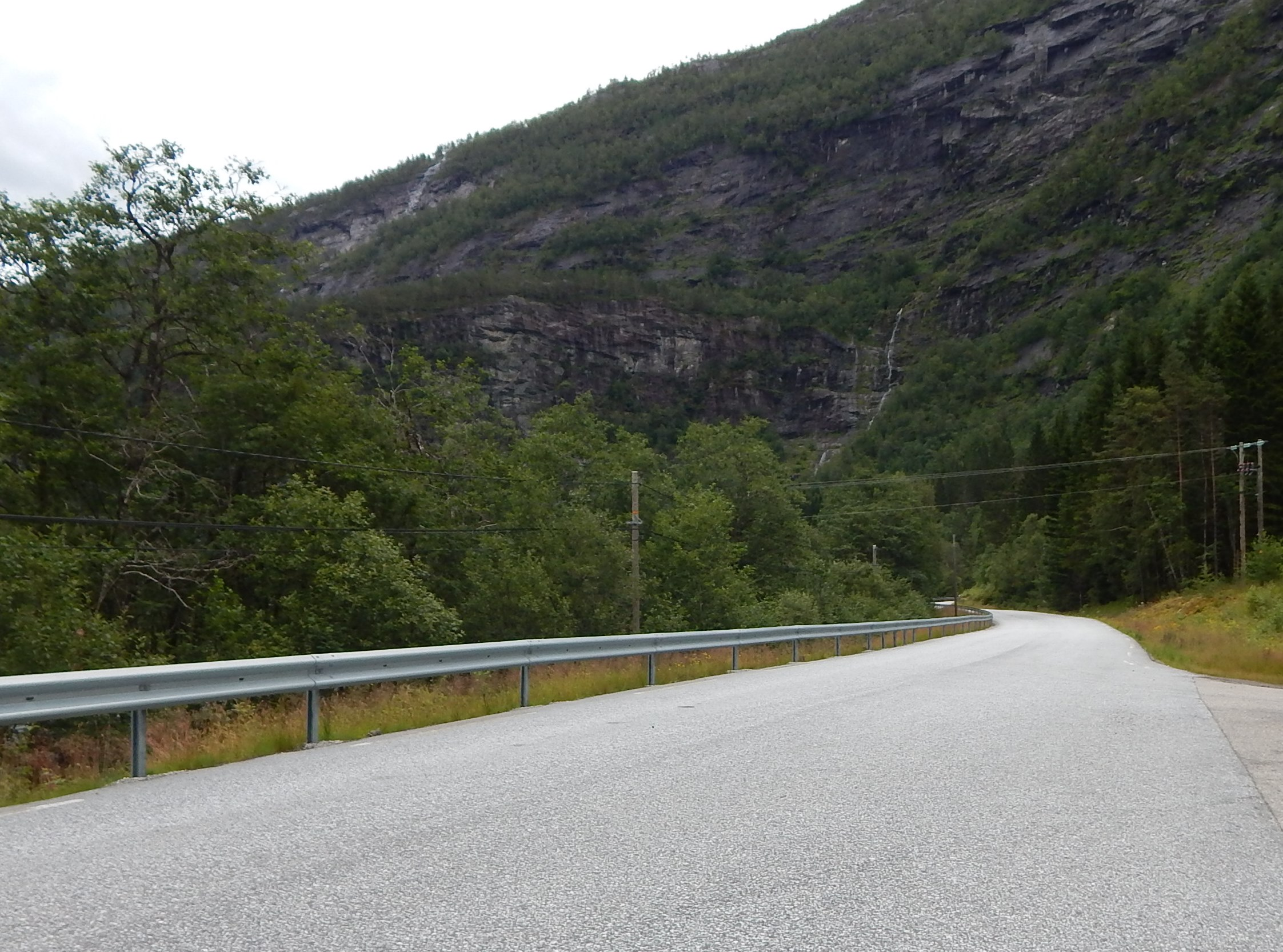 Fylkesvei 345 sett fra krysset med primær fylkesvei 569